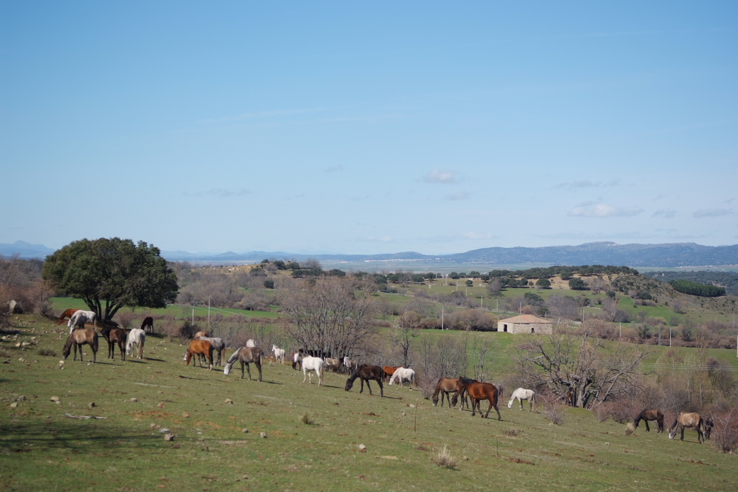 Caballos pastando en Villafranca de la Sierra (Ávila; España).